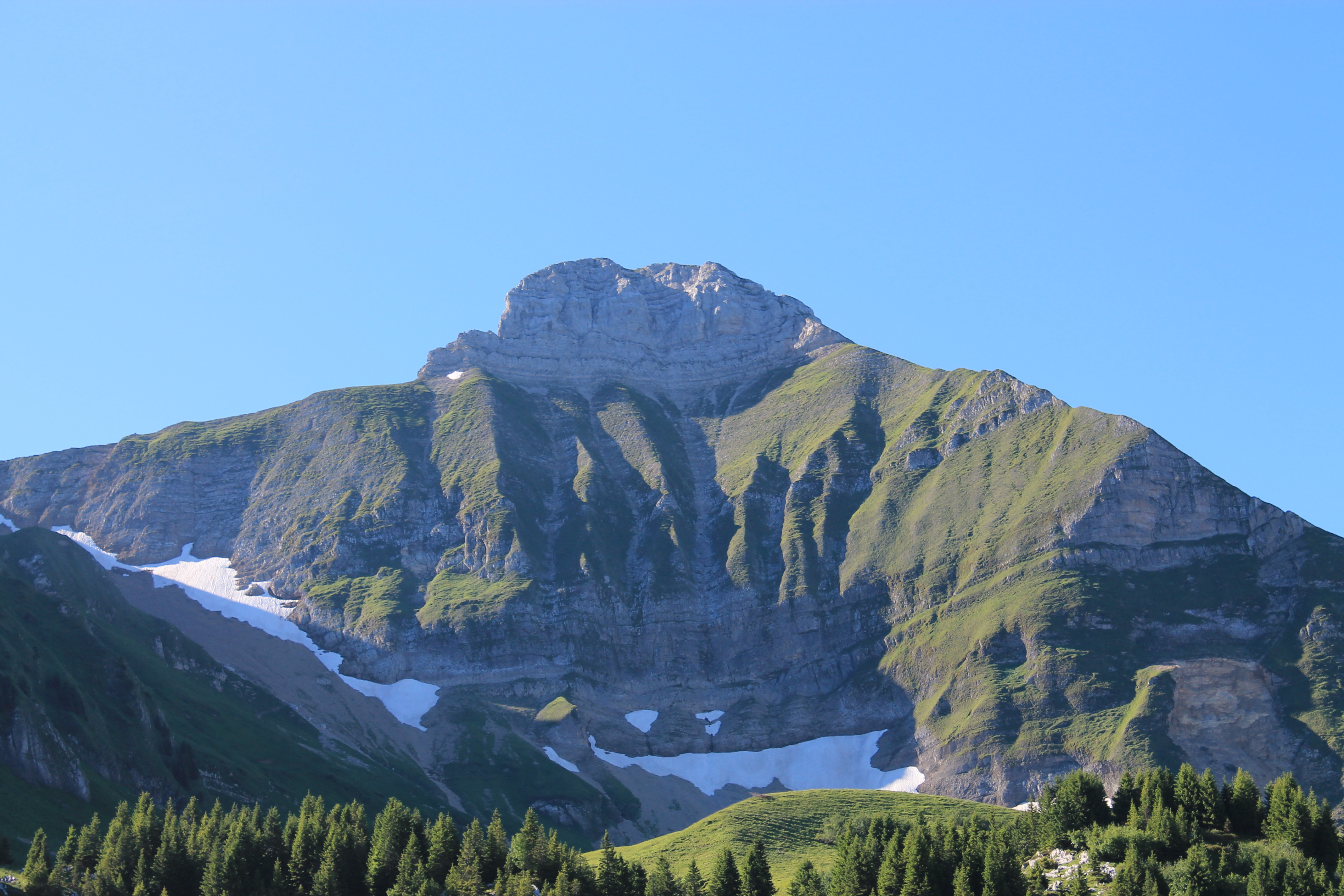 Pic de Jallouvre depuis le plateau de Cenise